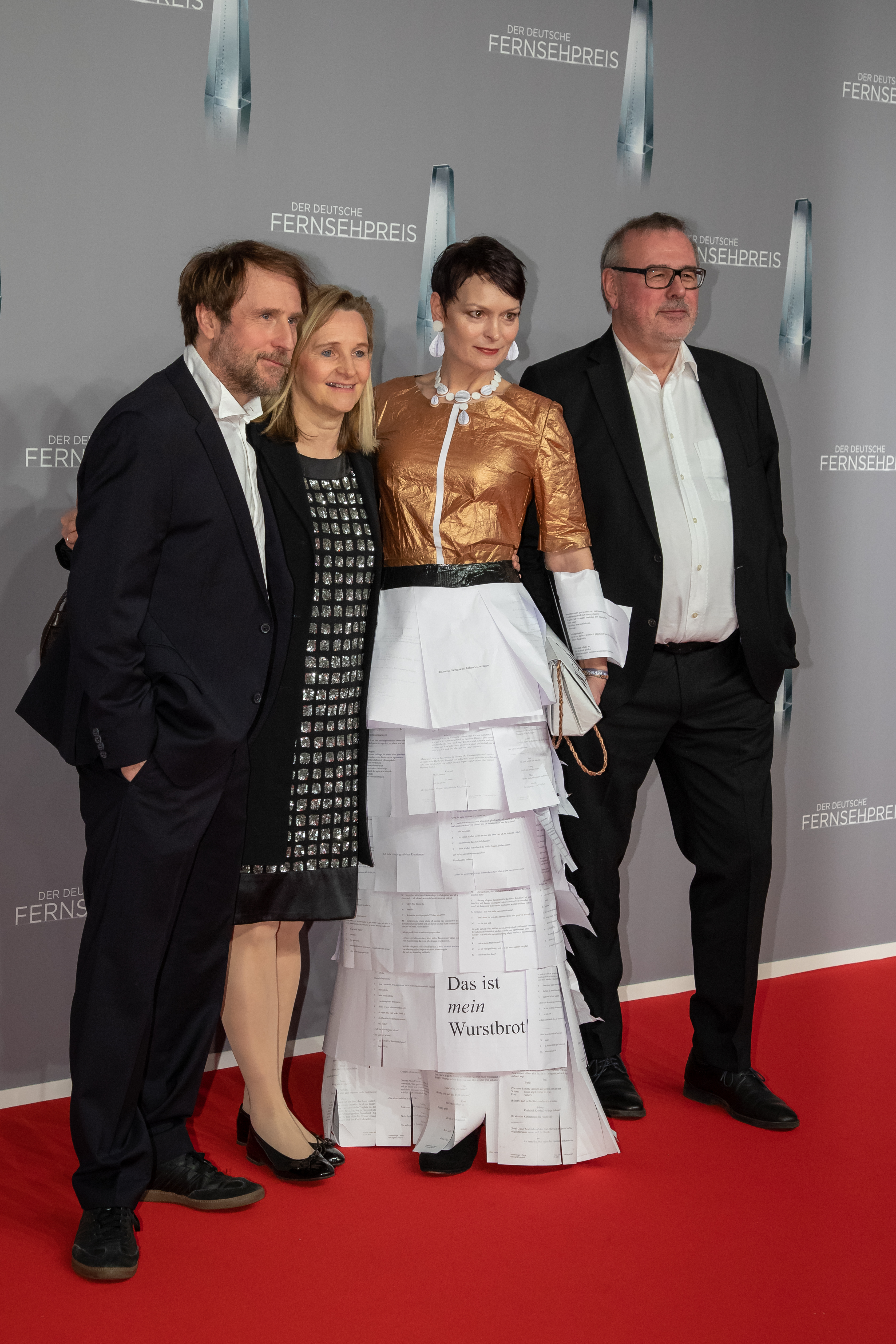 Team Tatortreiniger beim Deutschen Fernsehpreis 2019 in der Düsseldorfer Rheinterrasse